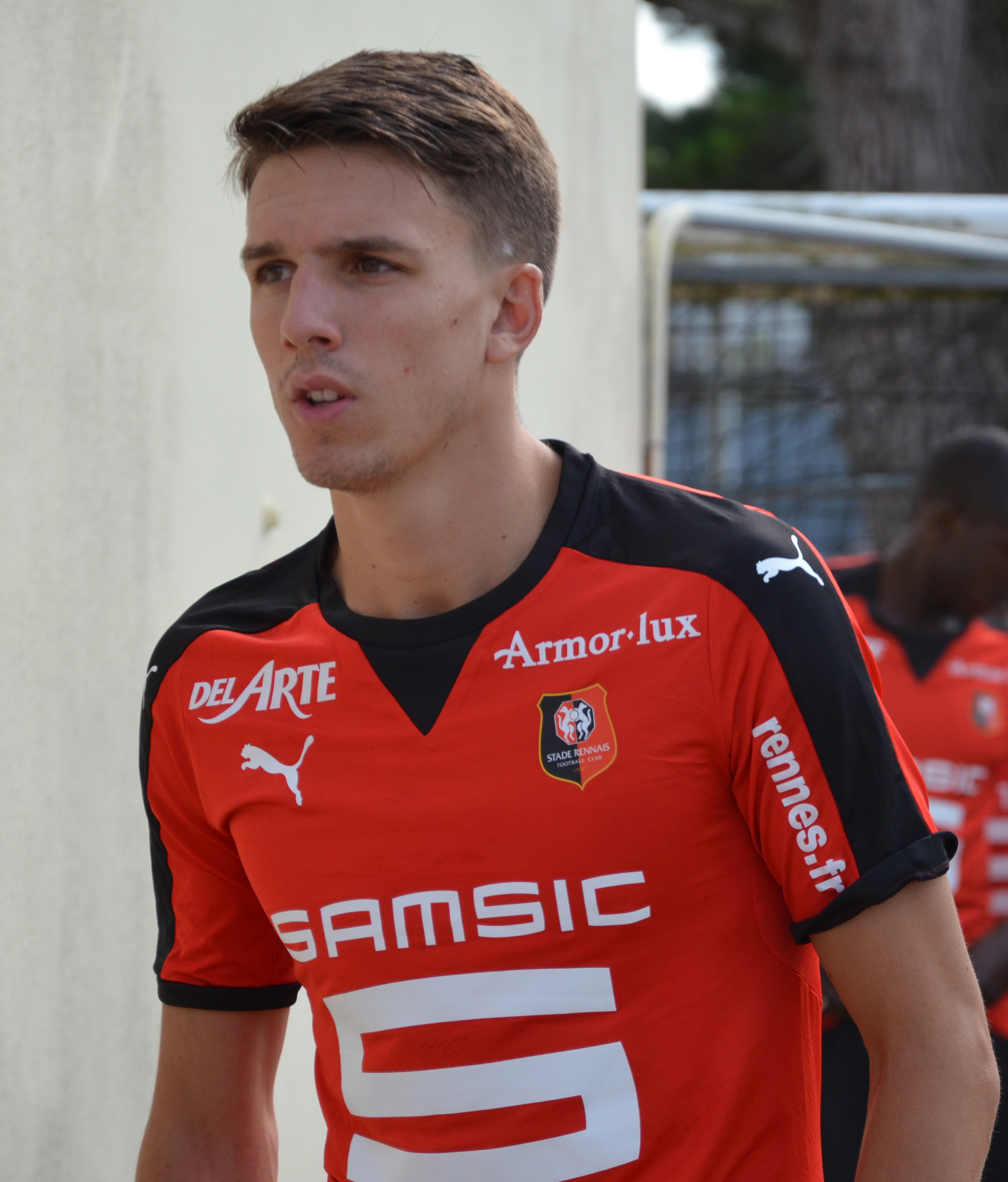 Photographie prise lors du match opposant le Stade rennais au Havre AC en amical au stade Paul-Audrin de Dinard le 8 juillet 2015. Ici, Adrien Hunou.